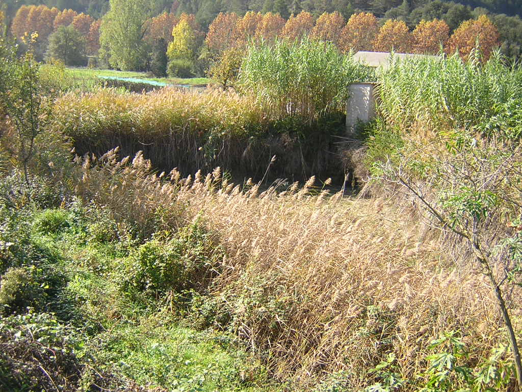 El Molí del Solà (Monistrol de Calders, Moianès)